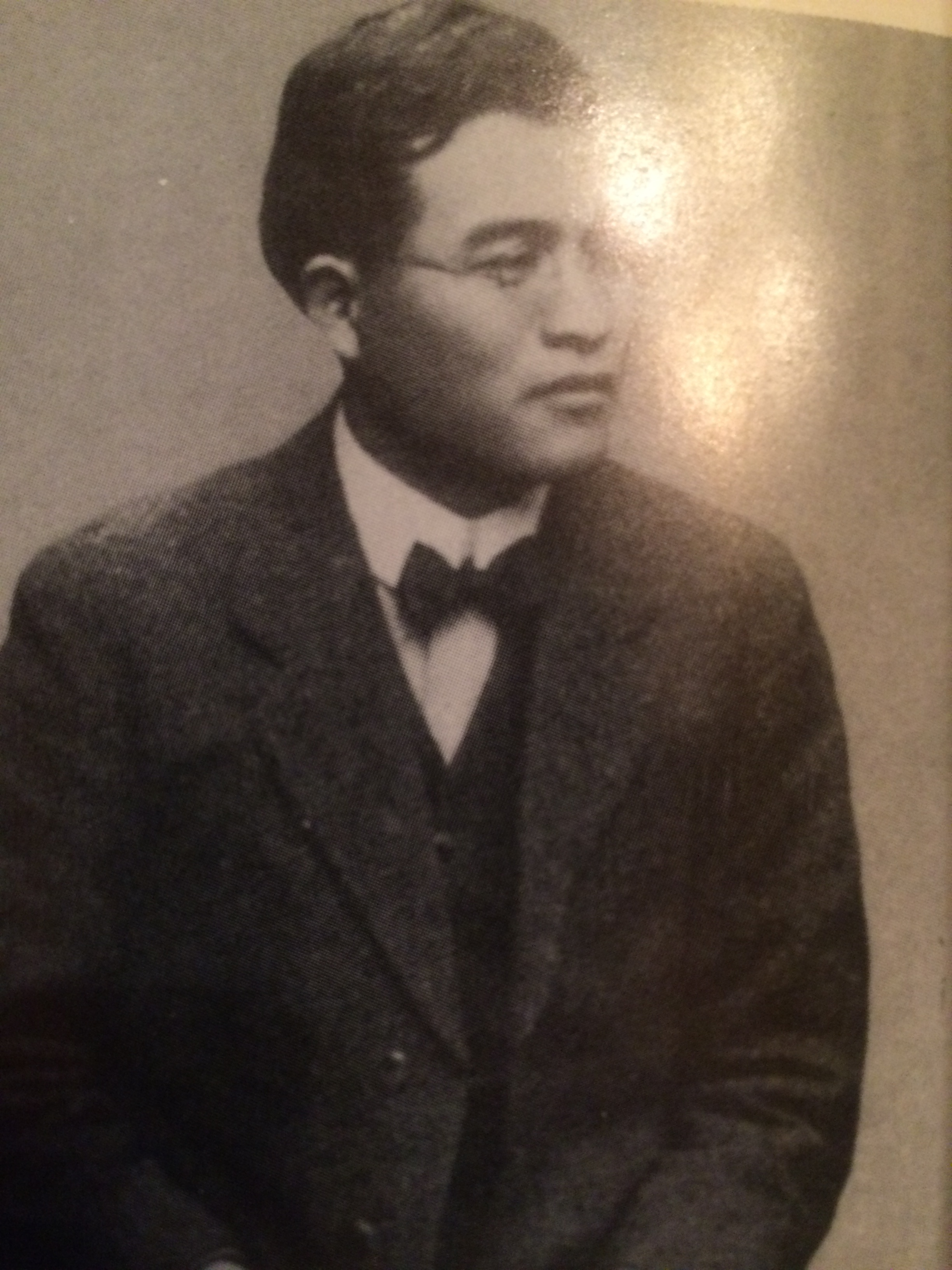 chikashikoizumi